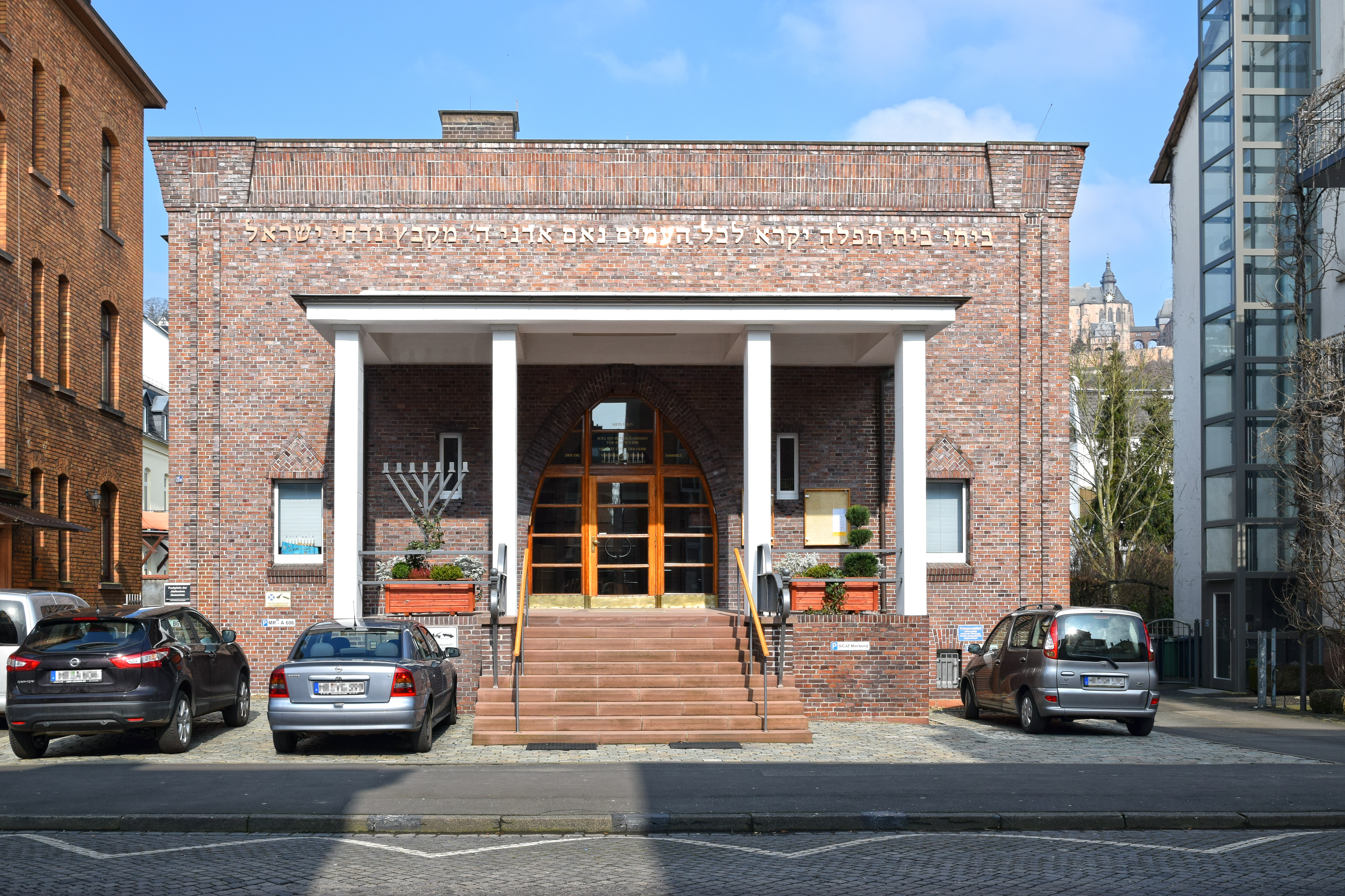 Die Synagoge in der Marburger Liebigstraße